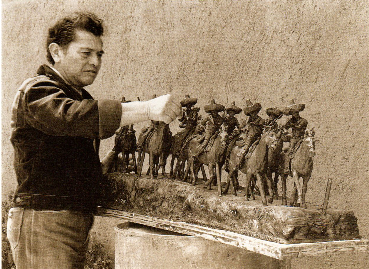 Andrés Peraza terminando tercera escena de conjunto zapatista 1983 bronce a la cera perdida 40 x 170 x 40 cms